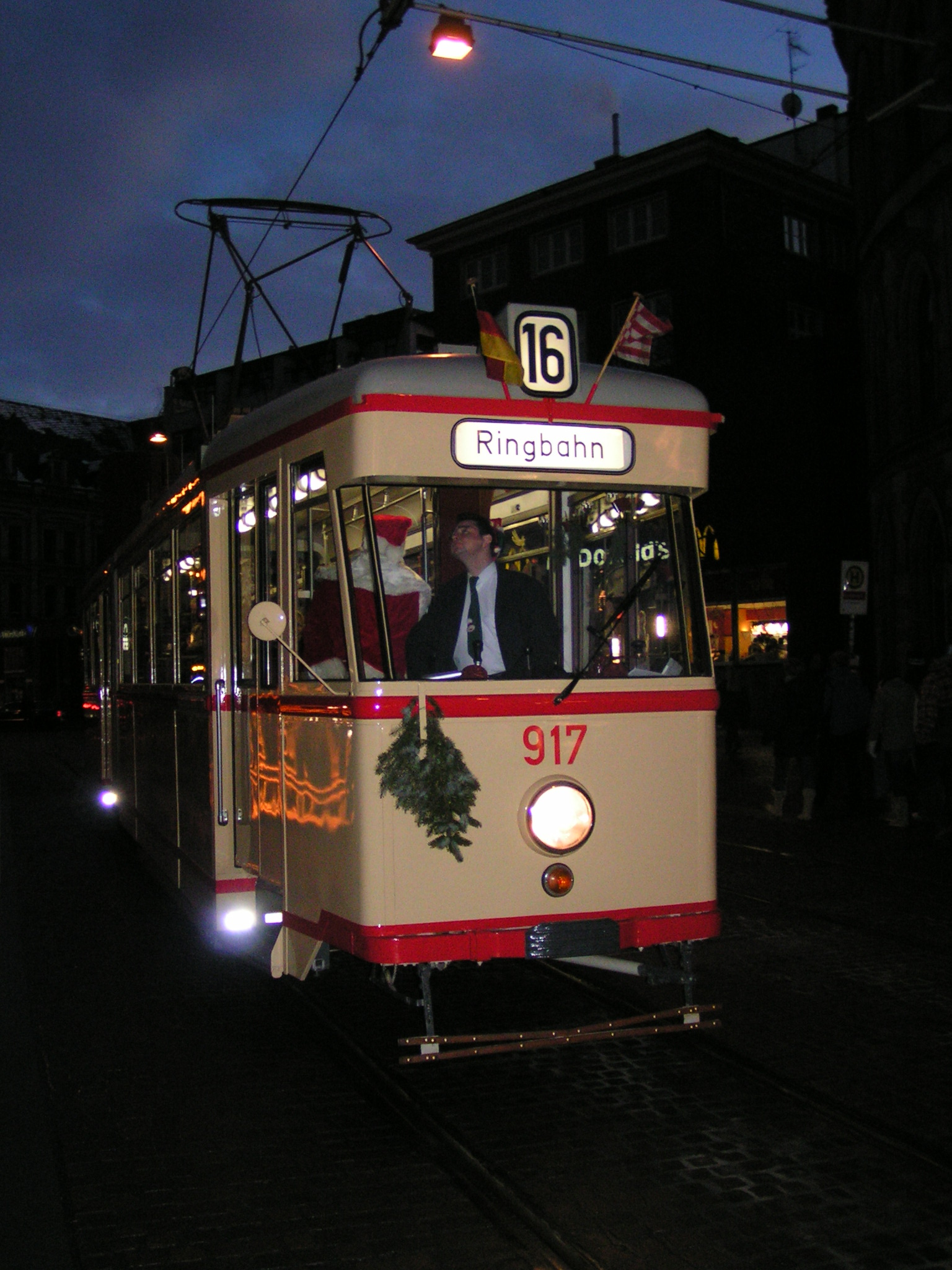 Museumsstraßenbahn-Linie 16 in Bremen